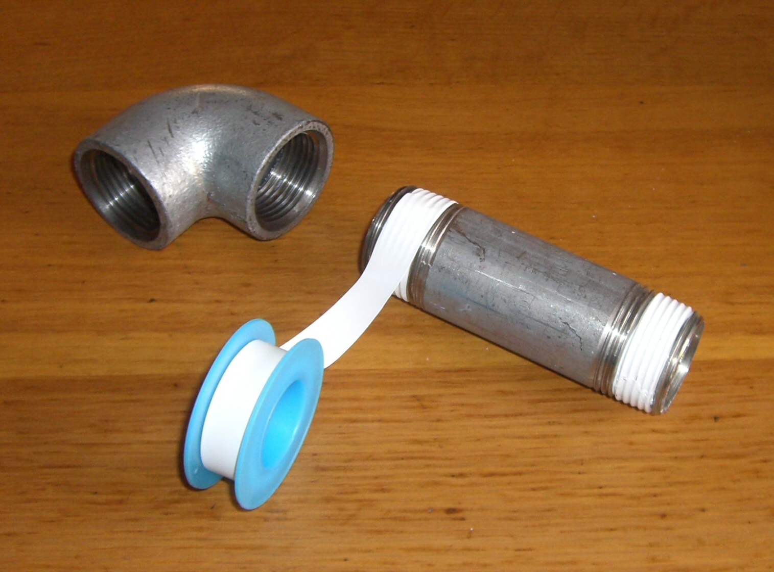 PTFE_tape (Seal_(mechanical)); シールテープ施工例 (シール (工学))